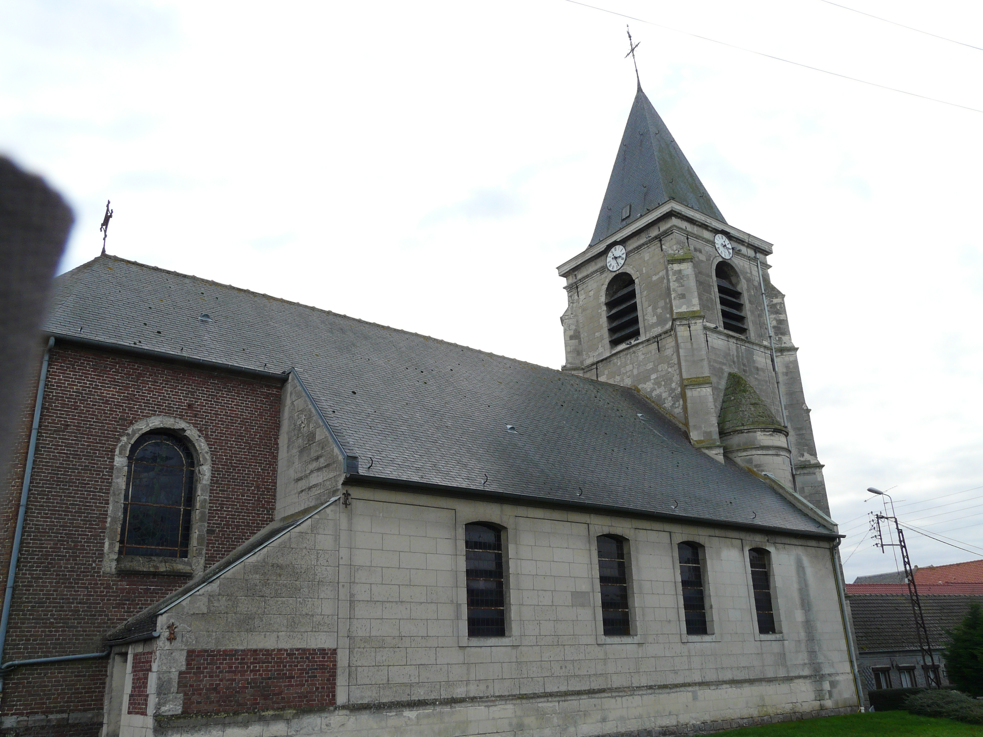 L'église d'Hem-Lenglet (Nord)